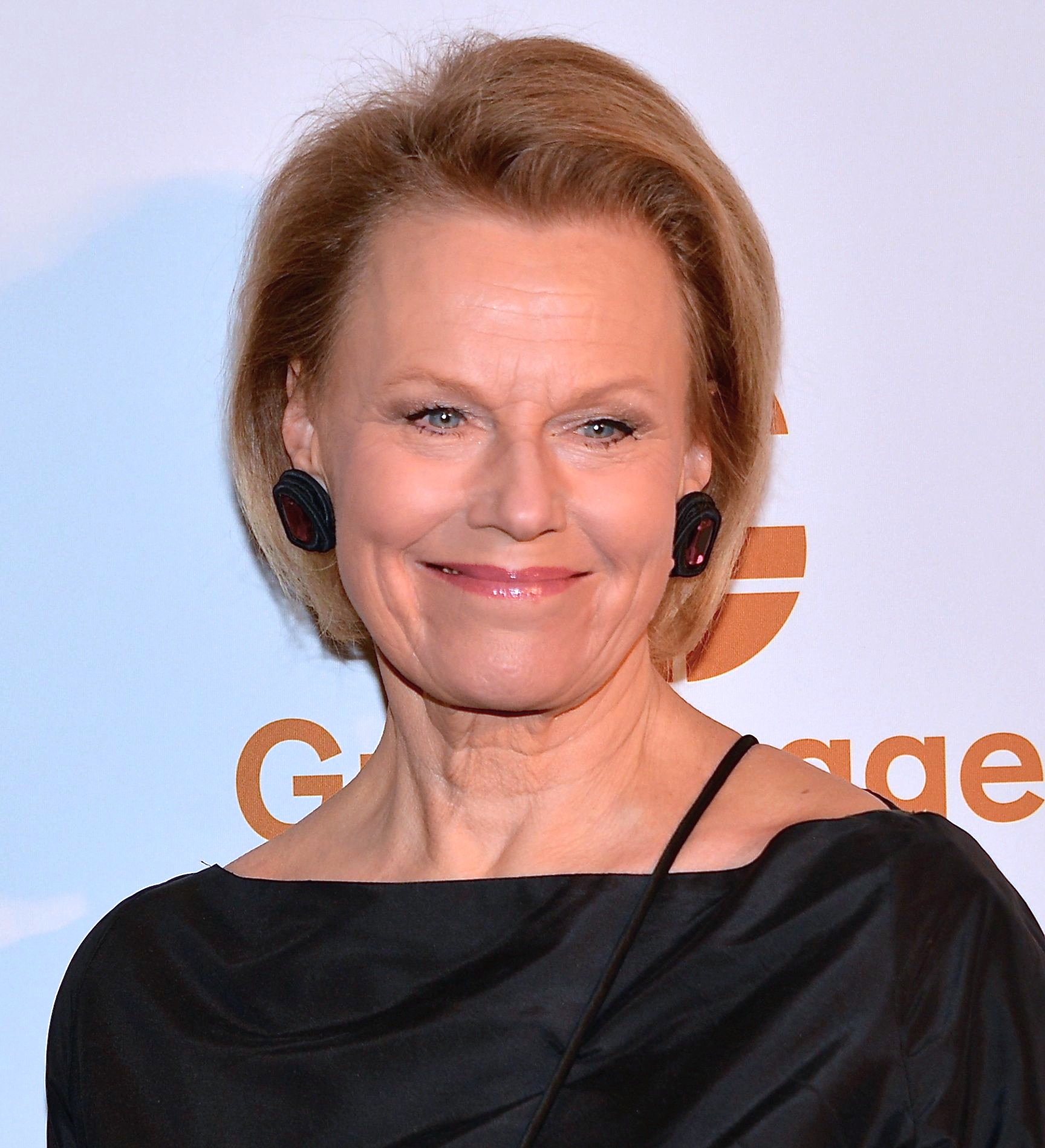 Arja Saijonmaa på Guldbaggegalan den 21 januari 2013.